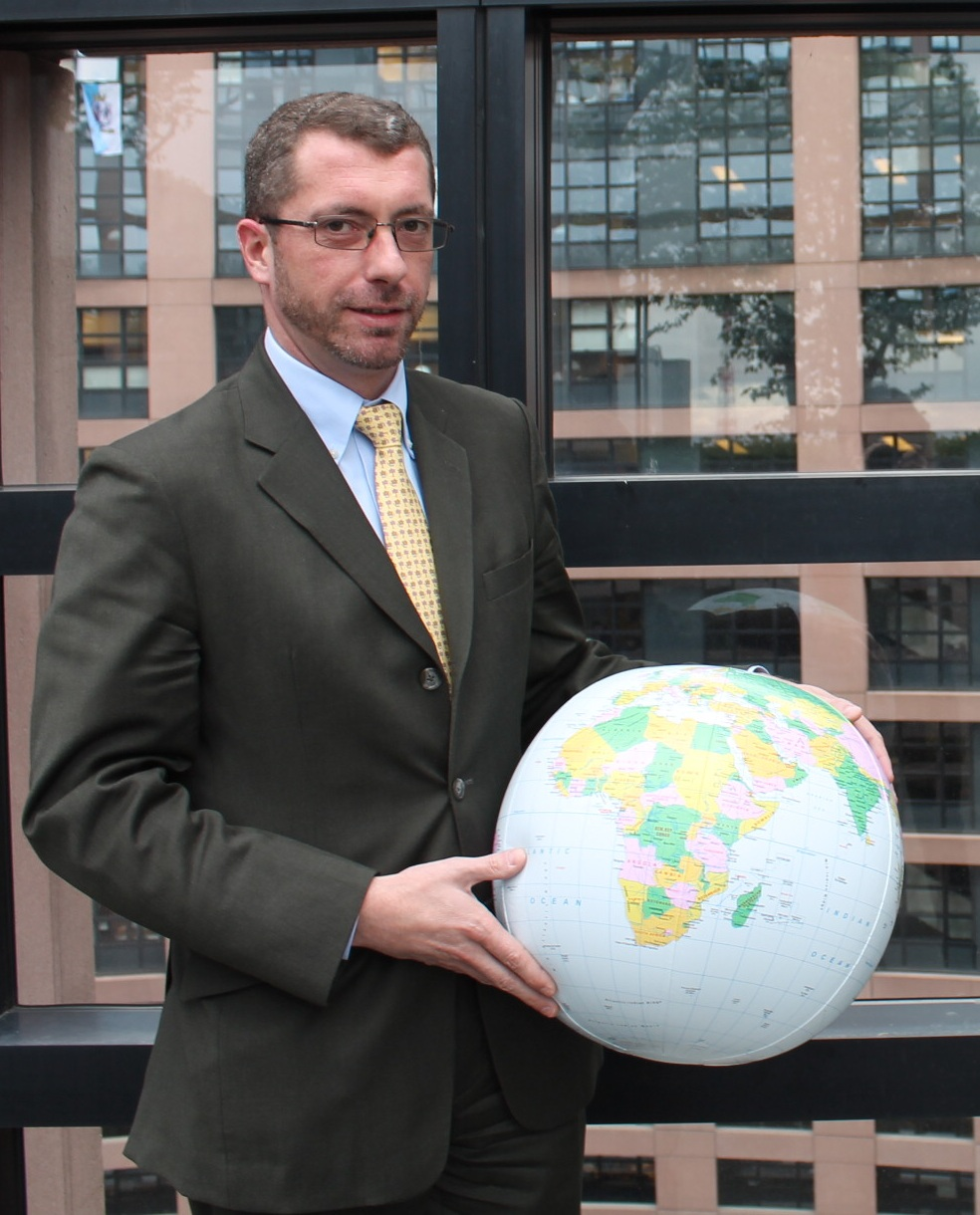 MEP Frank Engel, EPP, Luxembourg